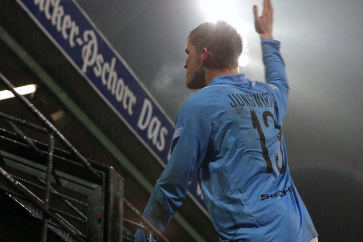 Florian Jungwirth auf dem Zaum 2009